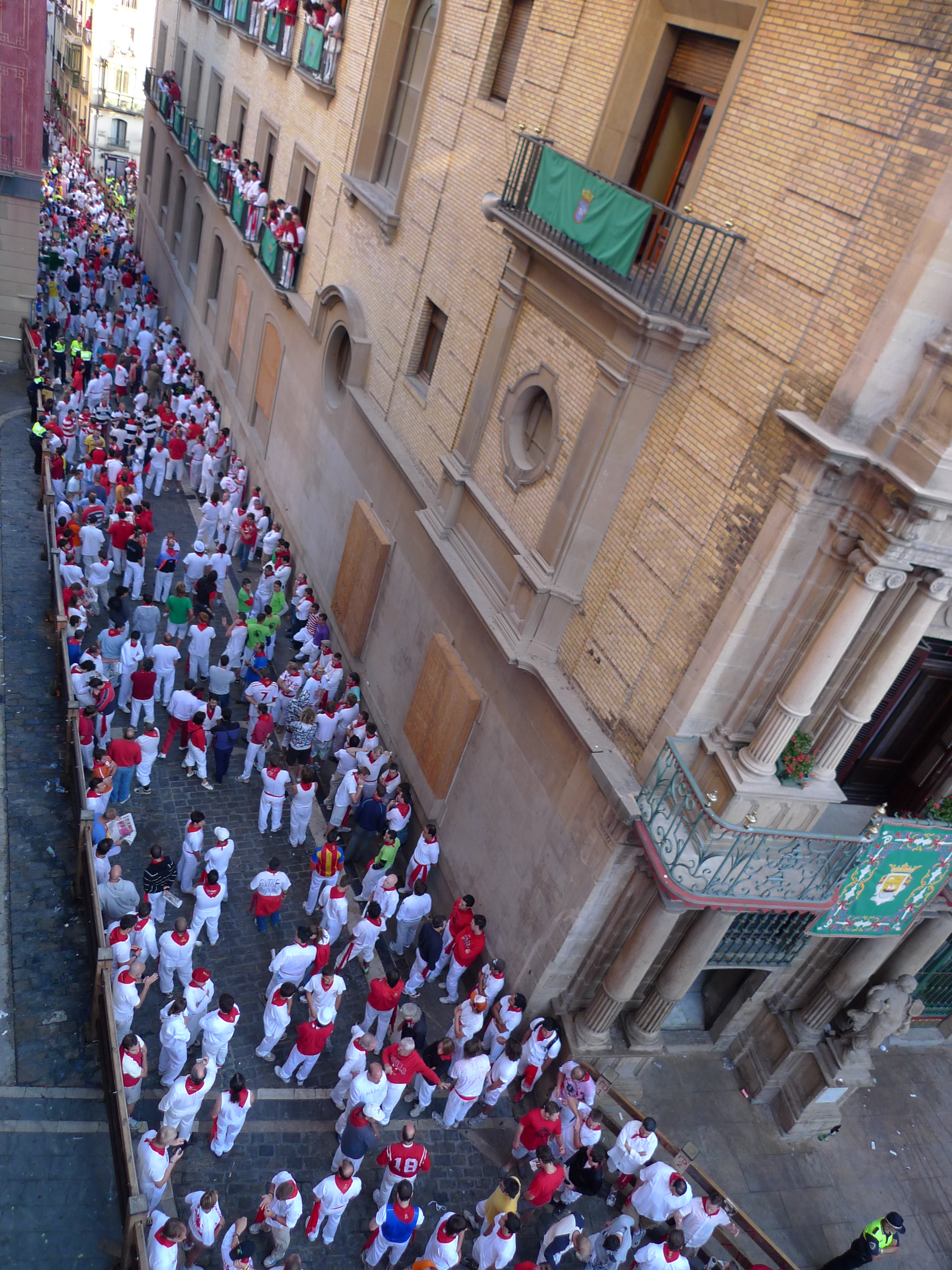 sanfermin 2009, pamplona, spain